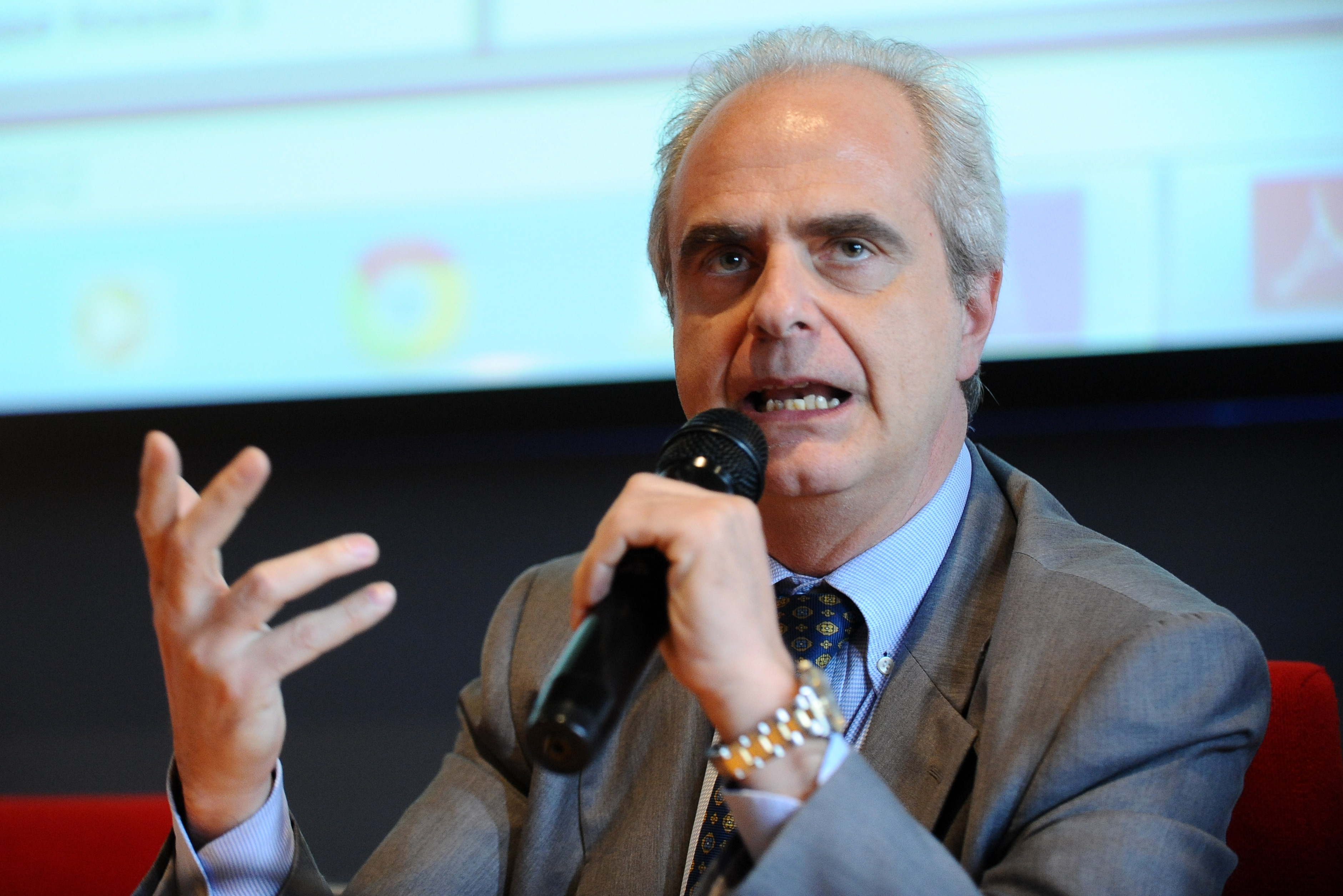 Teo Bellia al Festival delle Radio Universitarie 2012 a Pisa.